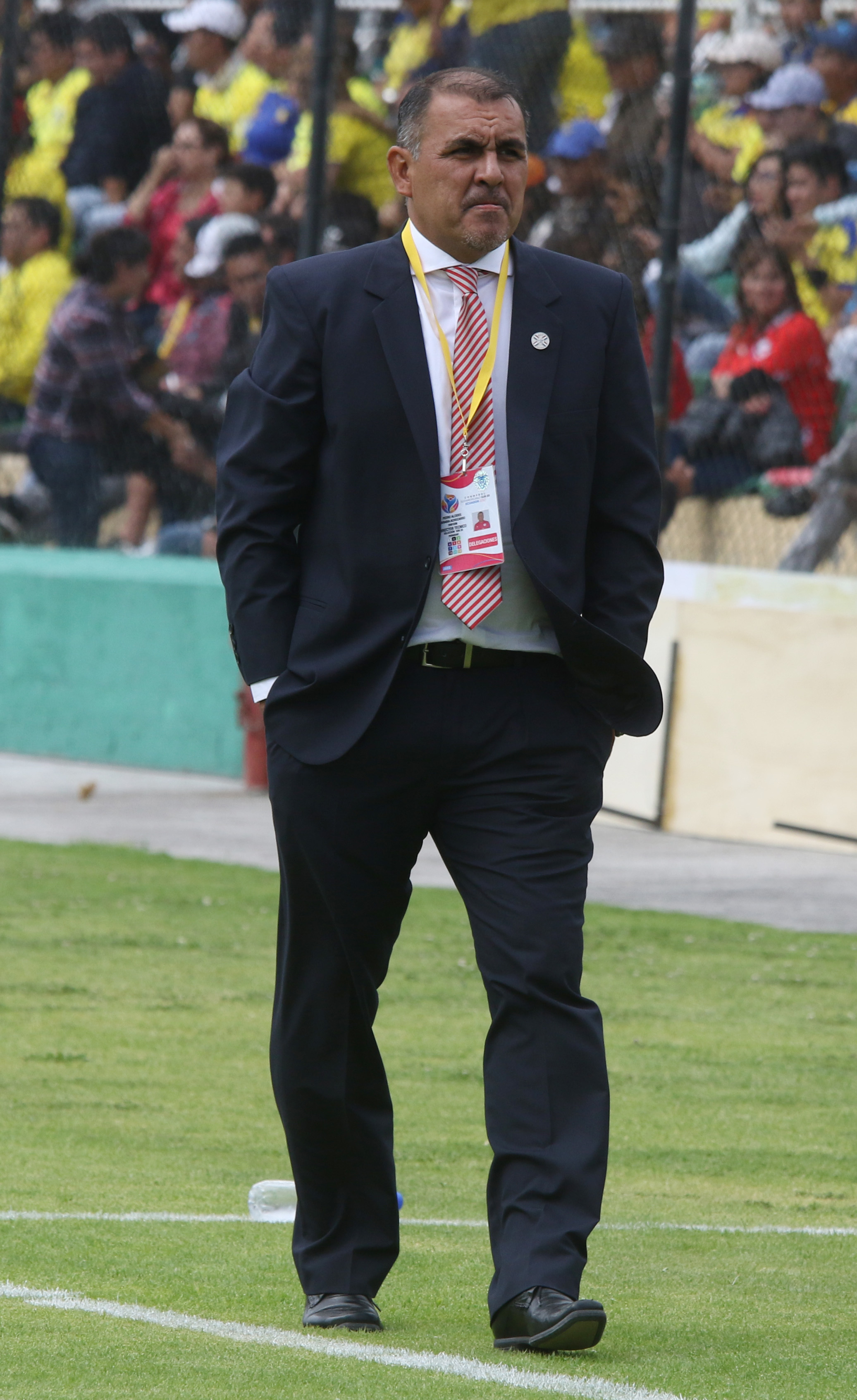 PARAGUAY BRASIL SUB 20 6 MAV